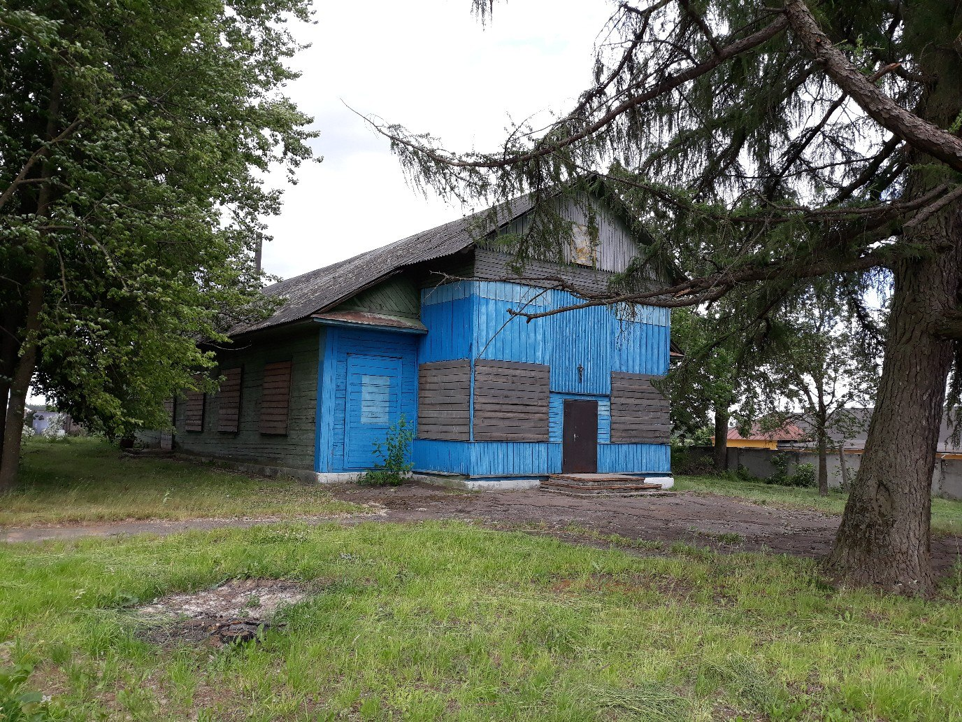 Касцёл Апекі Маці Божай